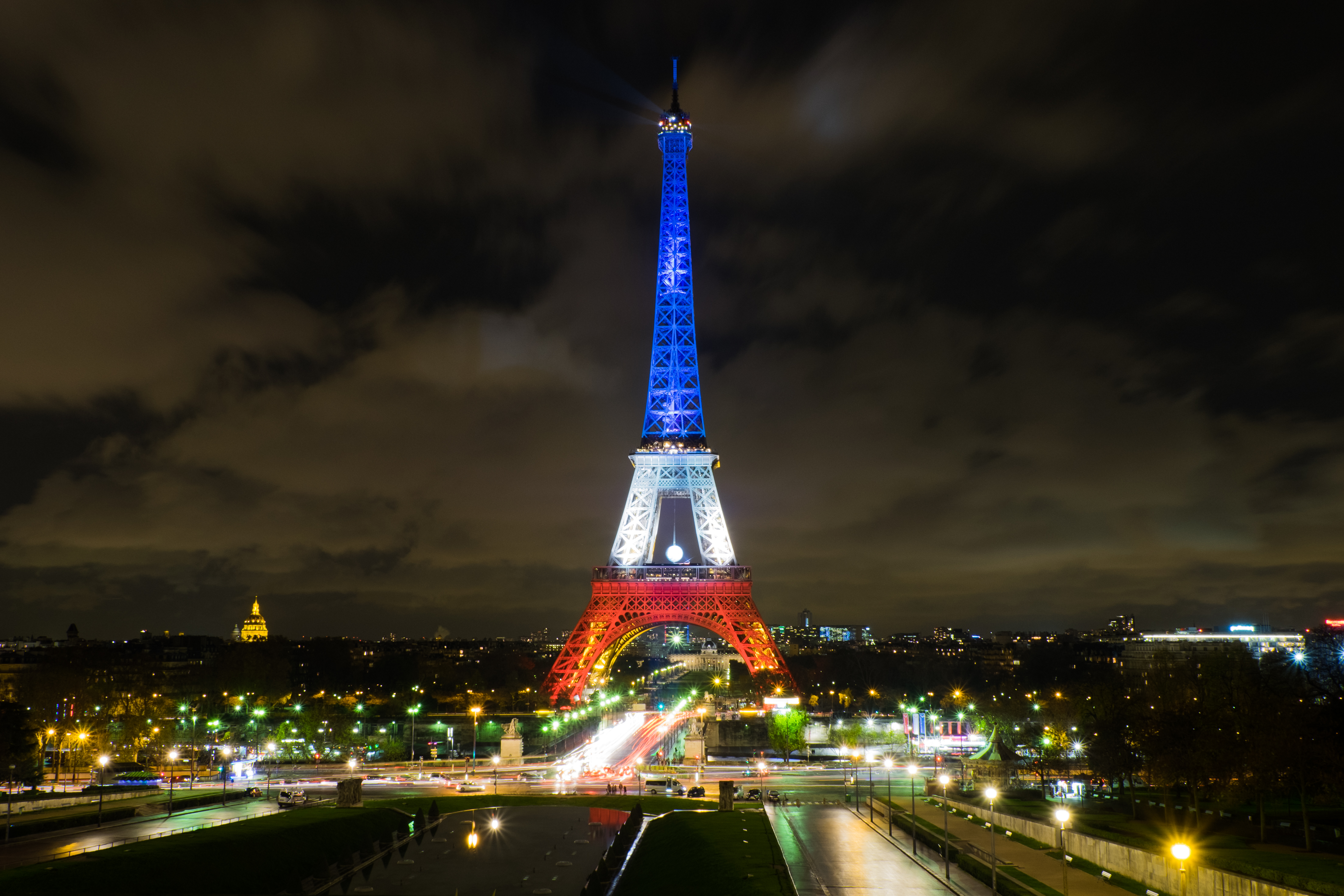 La tour Eiffel aux couleurs françaises après les attentats du 13 novembre 2015.